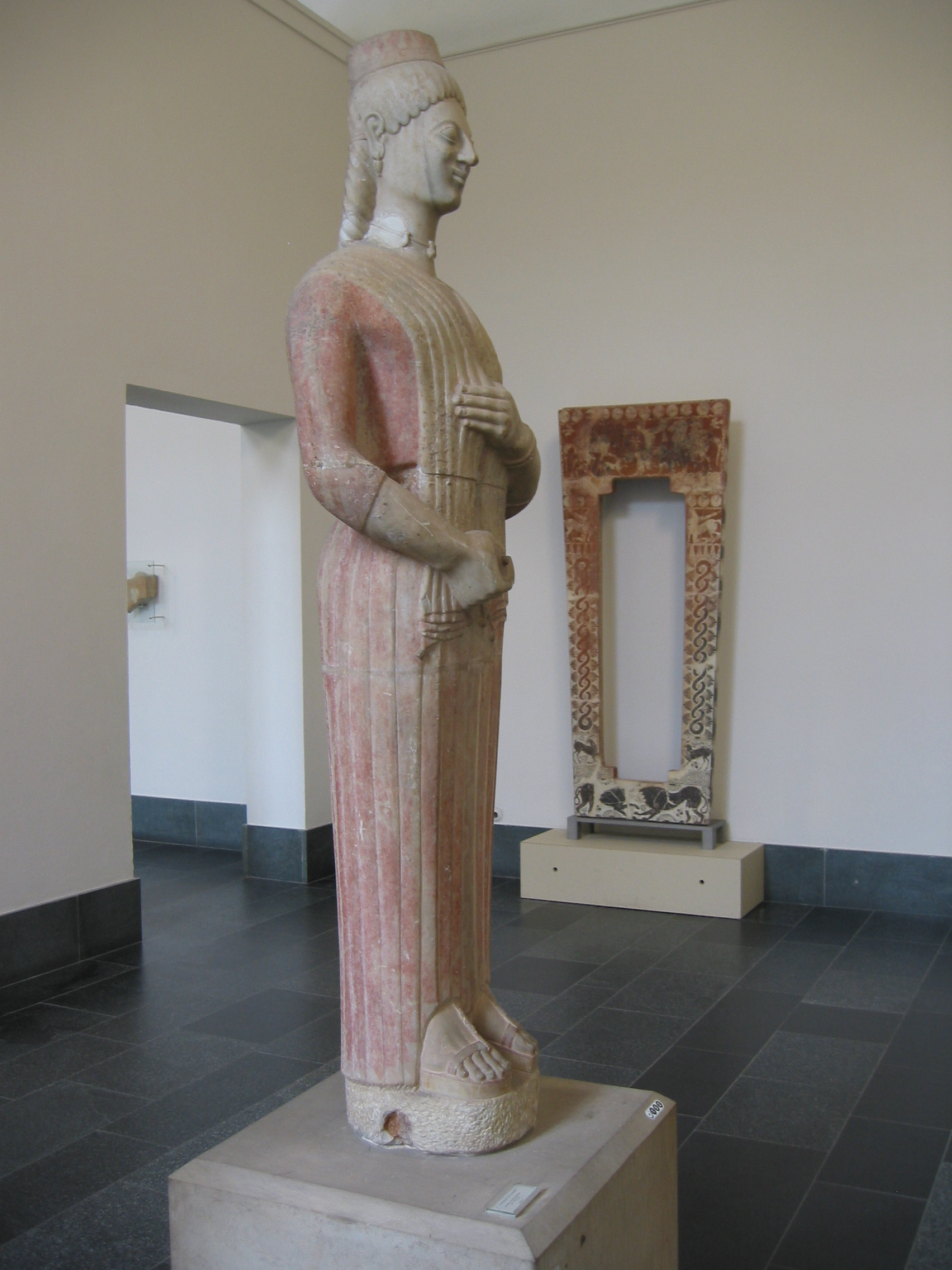 Statue der sogenannten Berliner Göttin, attisch, zwischen 580 und 560 v. Chr., Marmor, Höhe 193 cm, mit Restbemahlung, Antikensammlung Berlin (Sk 1800)